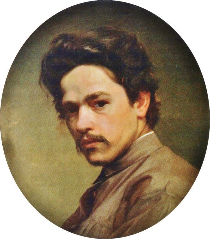 Nikolaj Jarošenko in un autoritratto